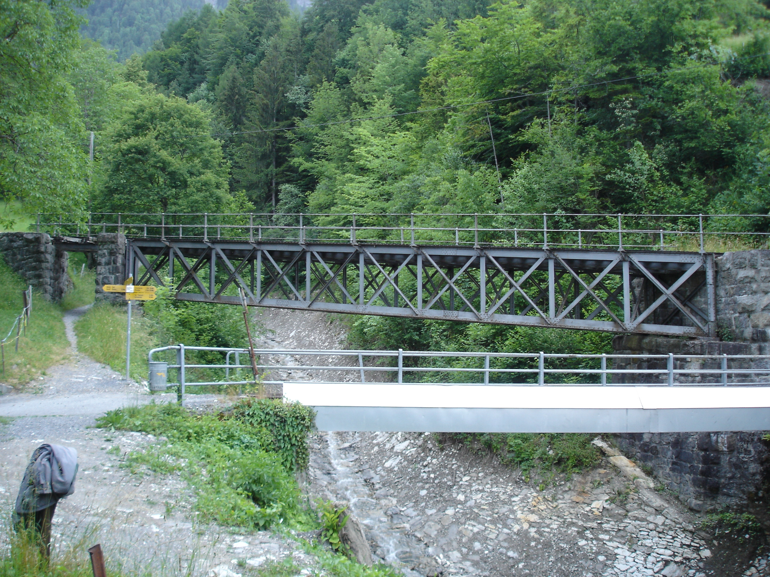 Wellenbergsbruecke der Brienzer Rothorn Bahn